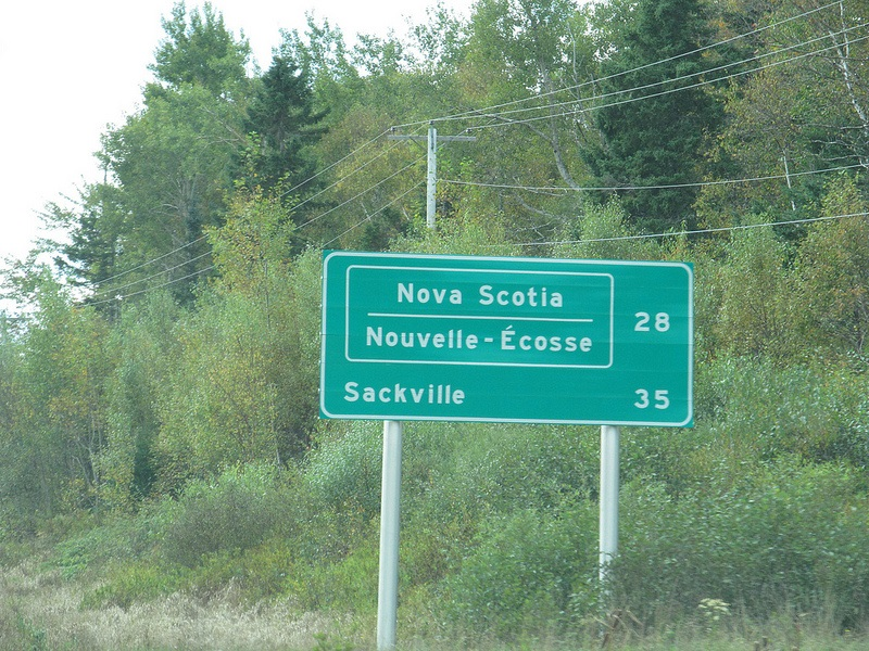 Panneau routier sur la Route 16 près de la Baie-Verte au Nouveau-brunswick indiquant la direction de la Nouvelle-Ecosse et de Sackville.